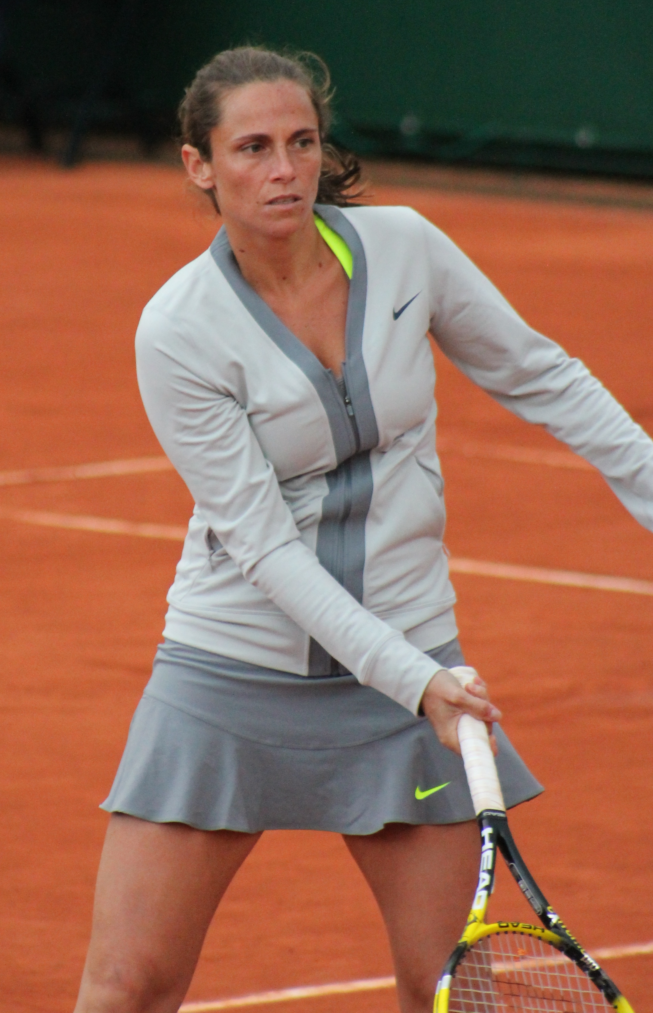 Vinci RG13 (5)